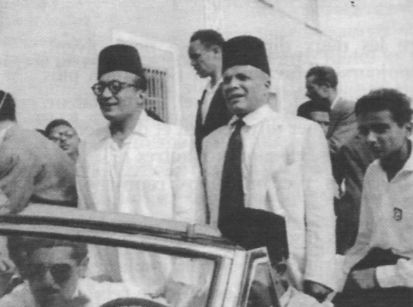 Arrivée de Salah Ben Youssef à Tunis : défilé en voiture avec Bourguiba dans les rues de Tunis